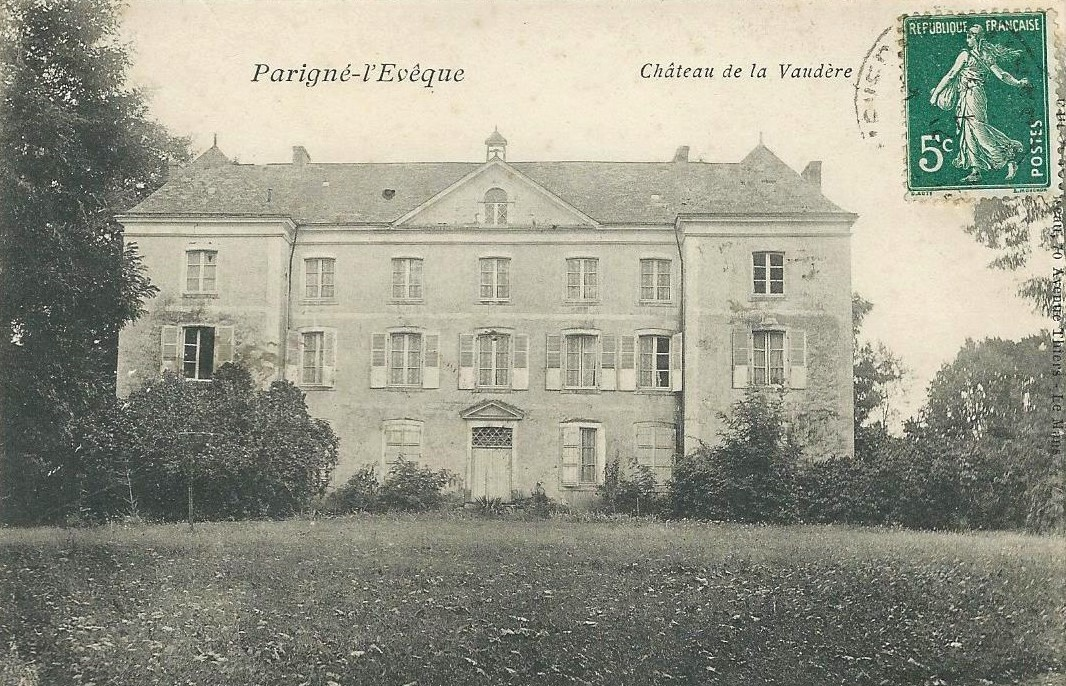 Château de la Vaudère Carte postale ancienne